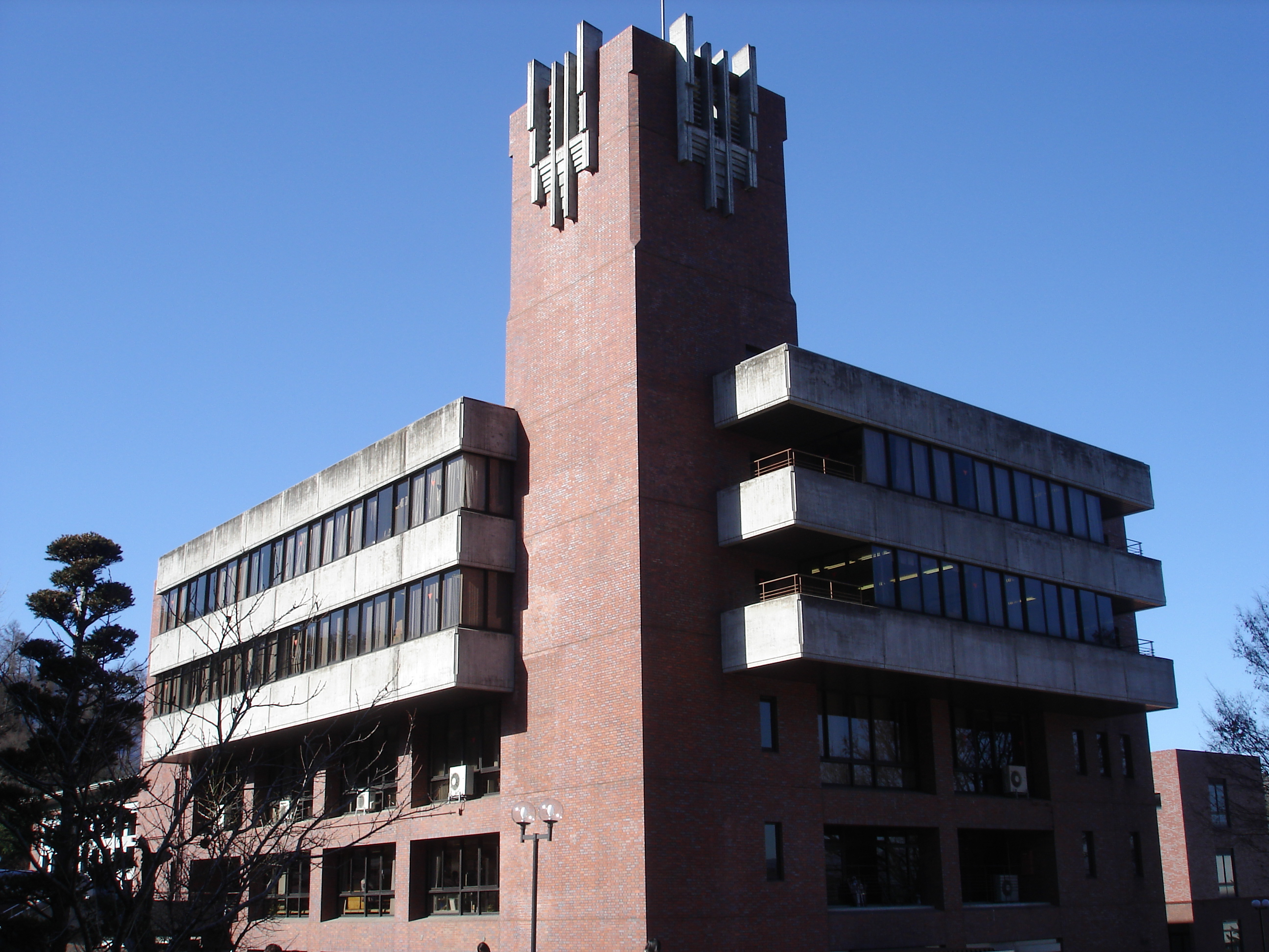 都留文科大学本部棟